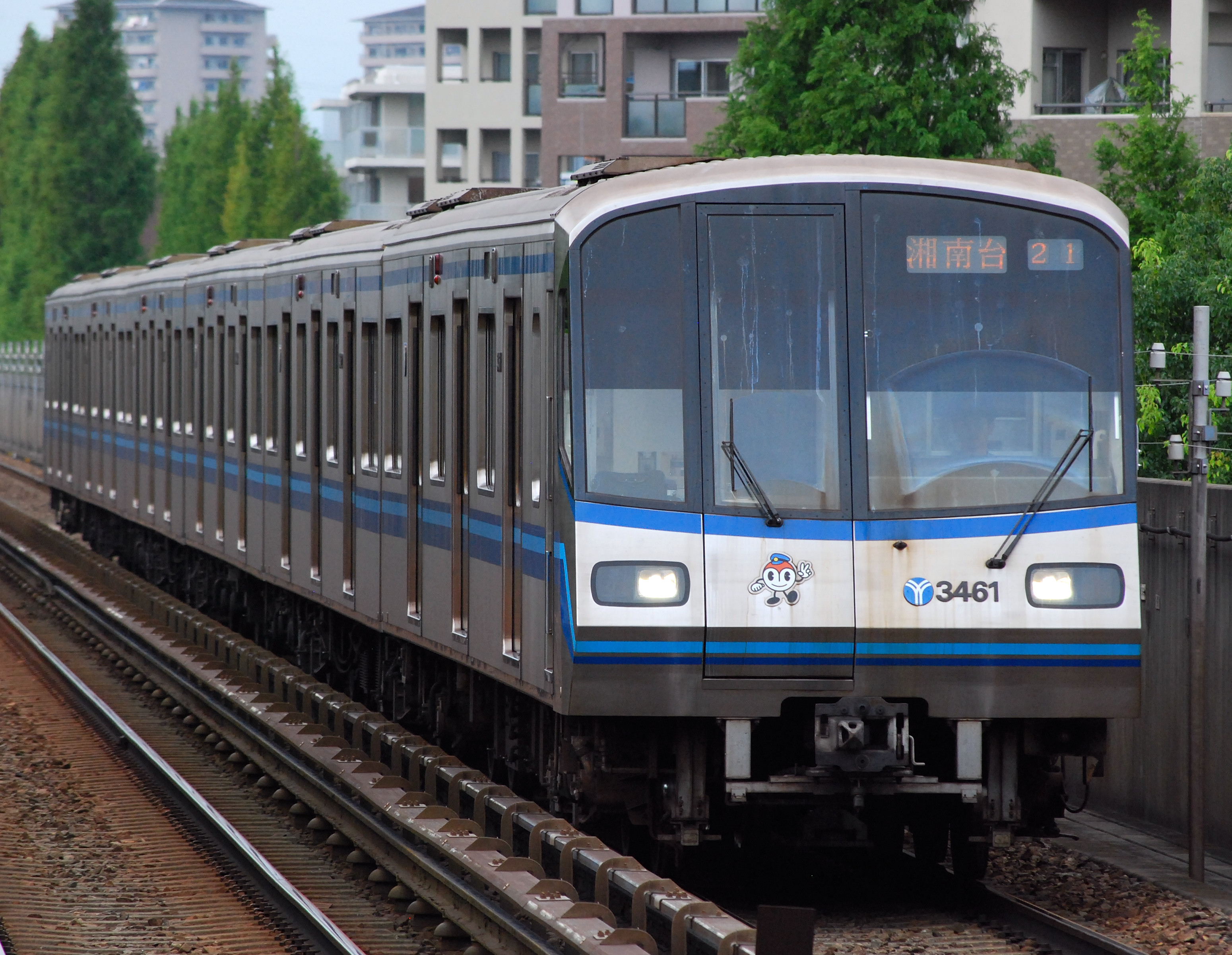 横浜市営地下鉄3000R系（仲町台駅で撮影）